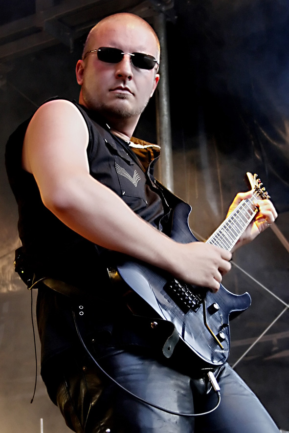 The Mystery, Deutsche Heavy-Metal-Band, Heiligenhaus